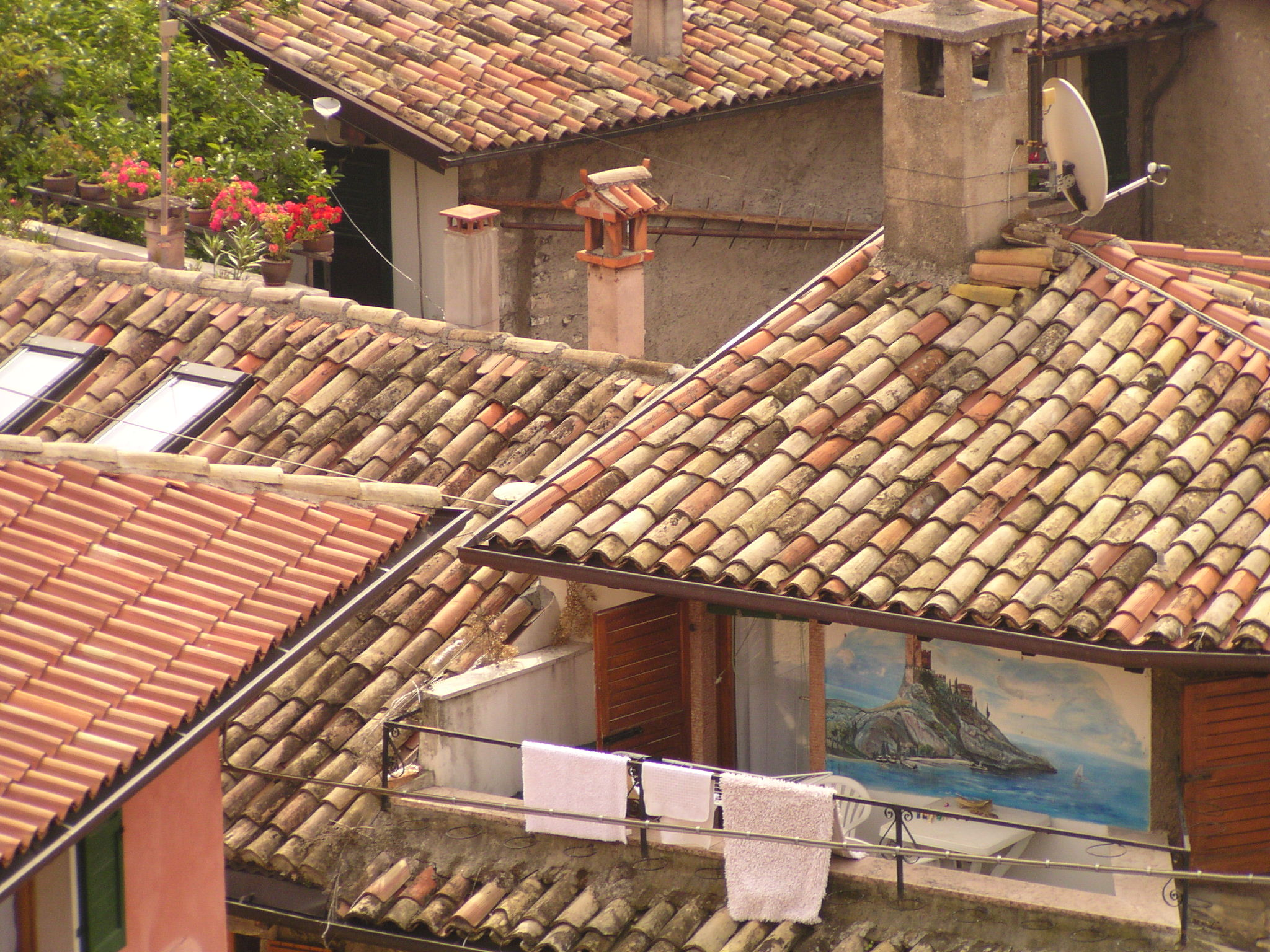 Blick auf Malcesine von der Scaliger Burg